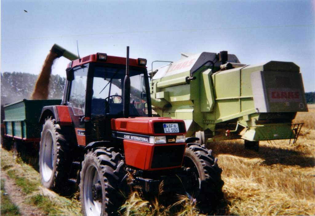 Traktor Case IH 745 XL Plus mit Kipper, Claas-Mähdrescher beim Abtanken, Deutschland